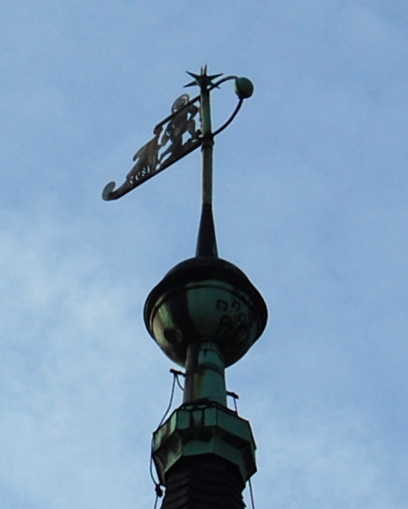 Wetterfahne auf dem Kirchturm der Sankt-Stephanus-Kirche Magdeburg-Westerhüsen